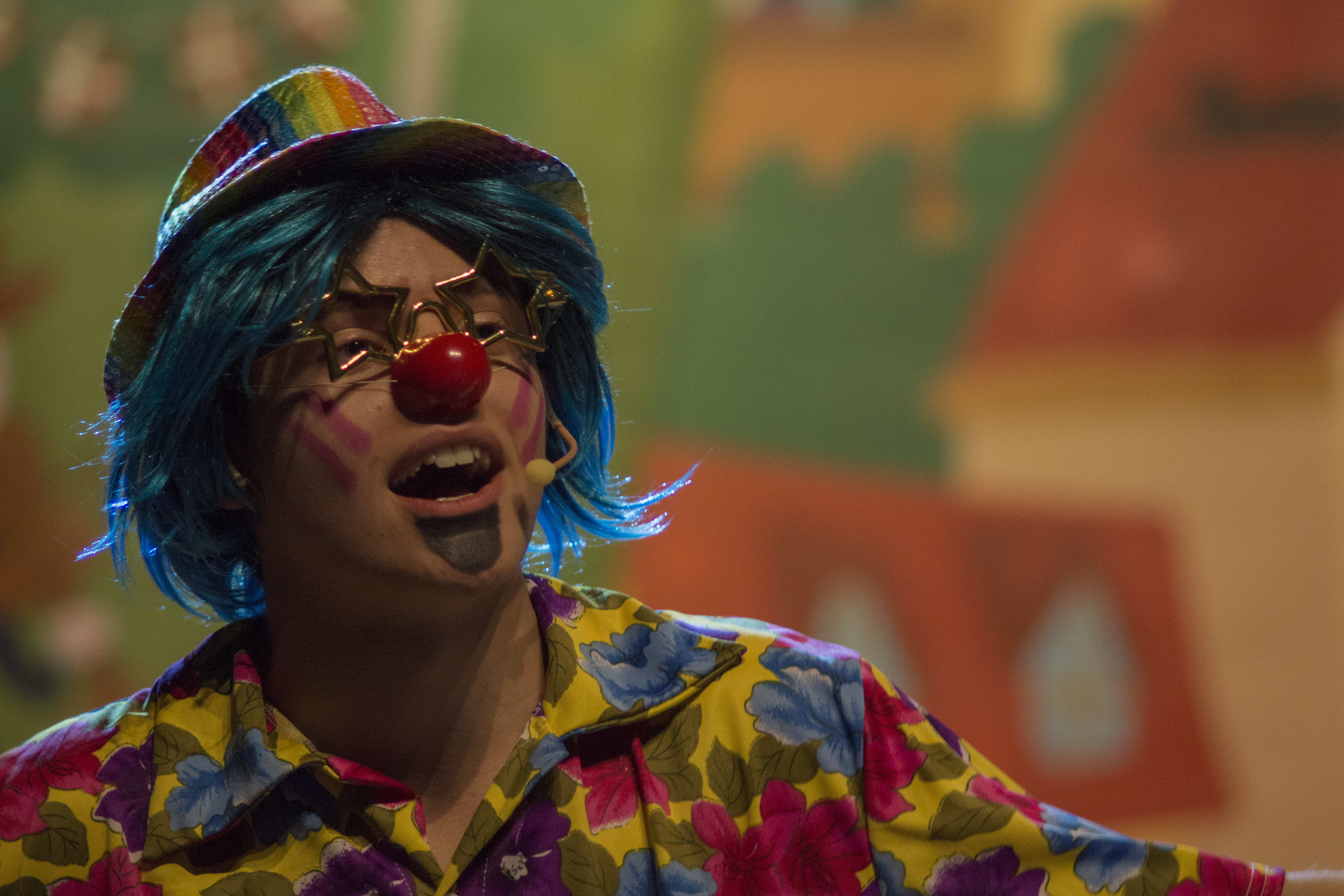 XABI SOUND